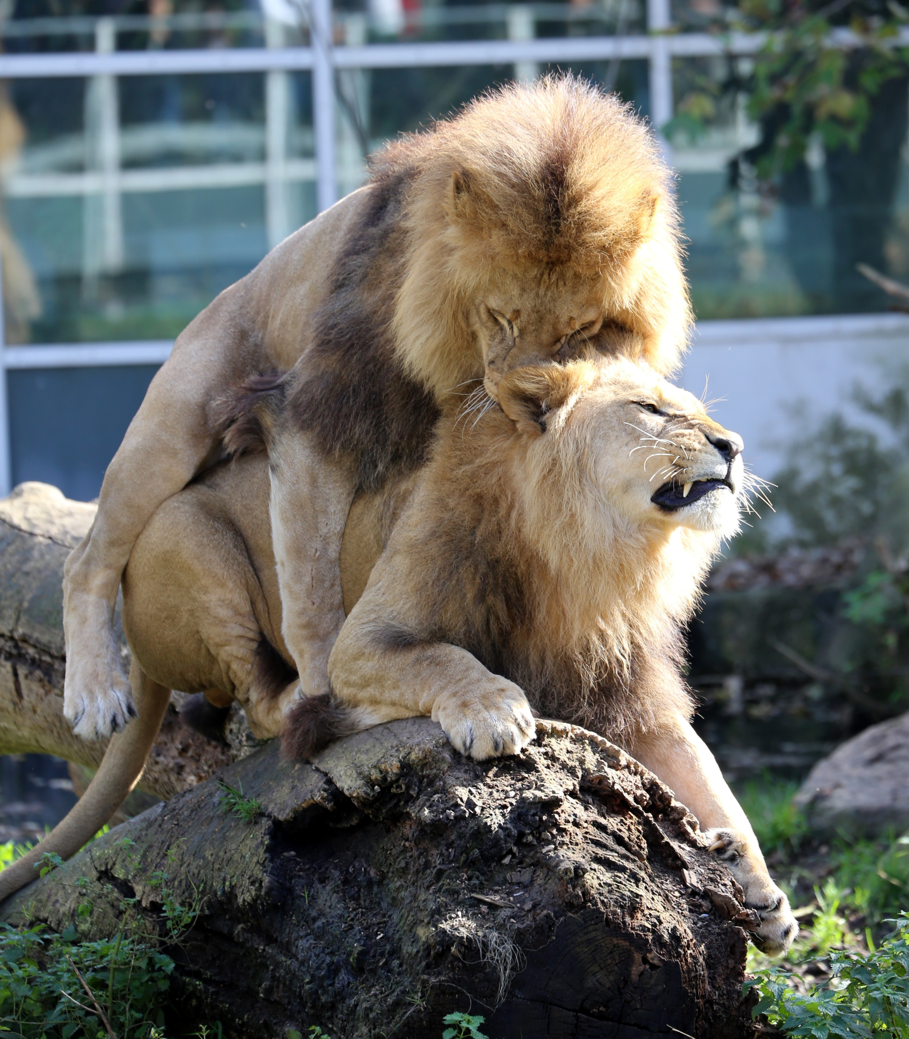 Zwei junge männliche Löwen (Panthera leo), Tierpark Hellabrunn, München